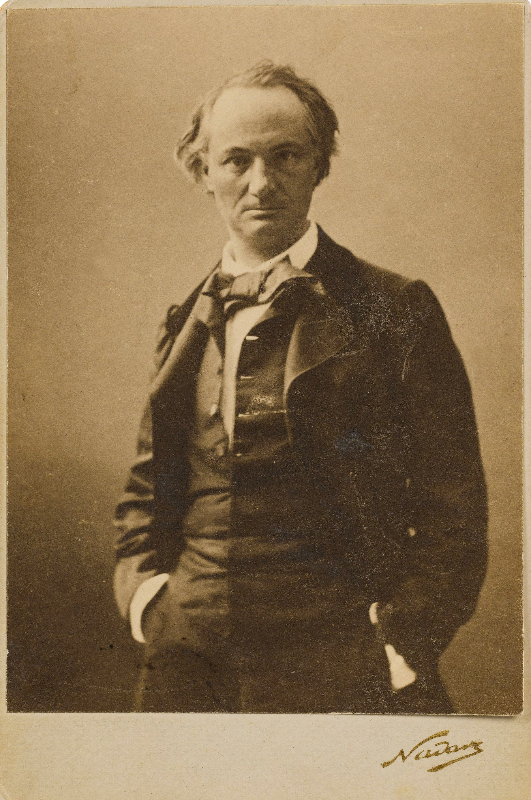 Portrait of Charles Baudelaire